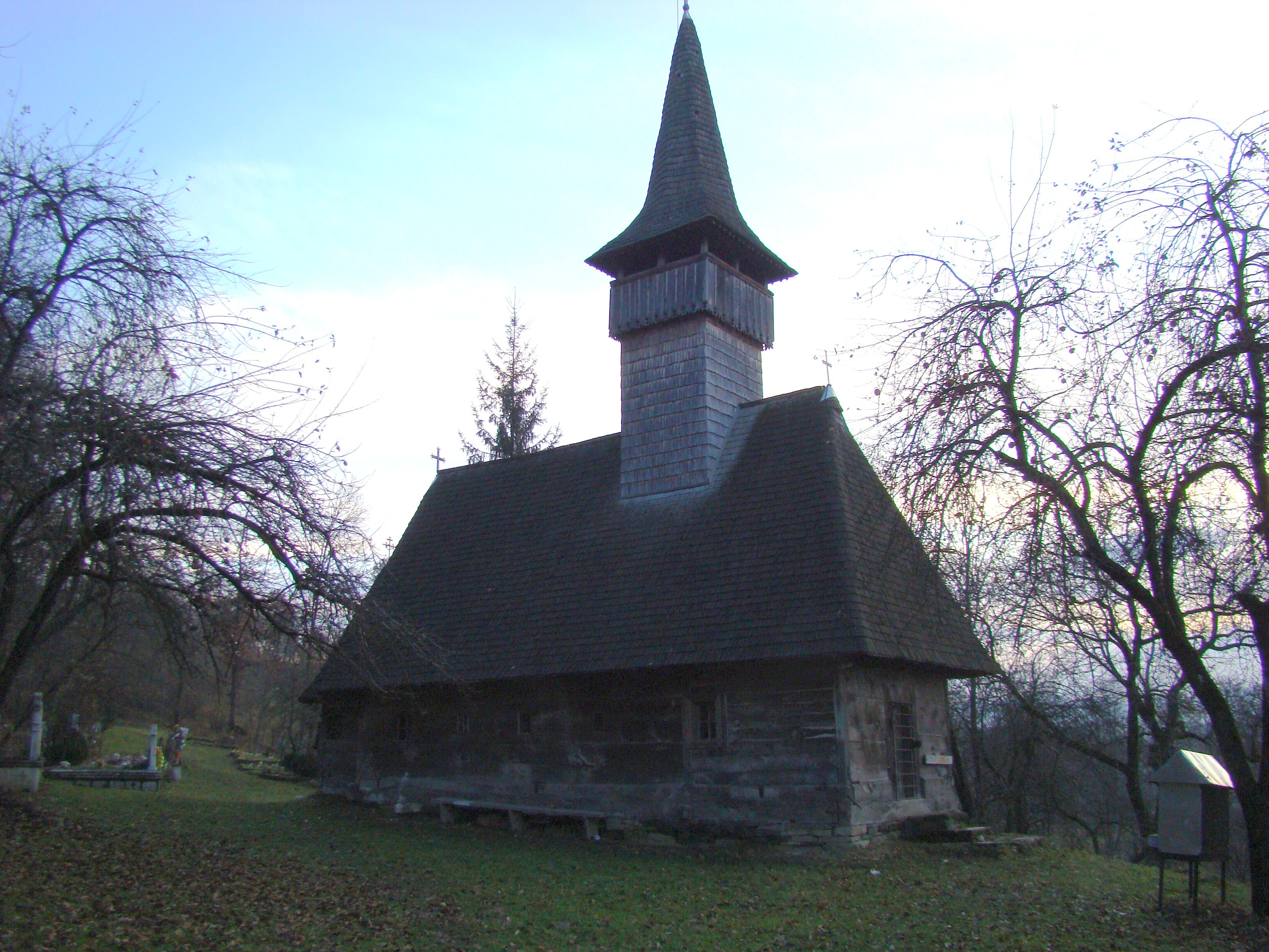 Biserica de lemn sat Mănăstirea, județul Maramureș